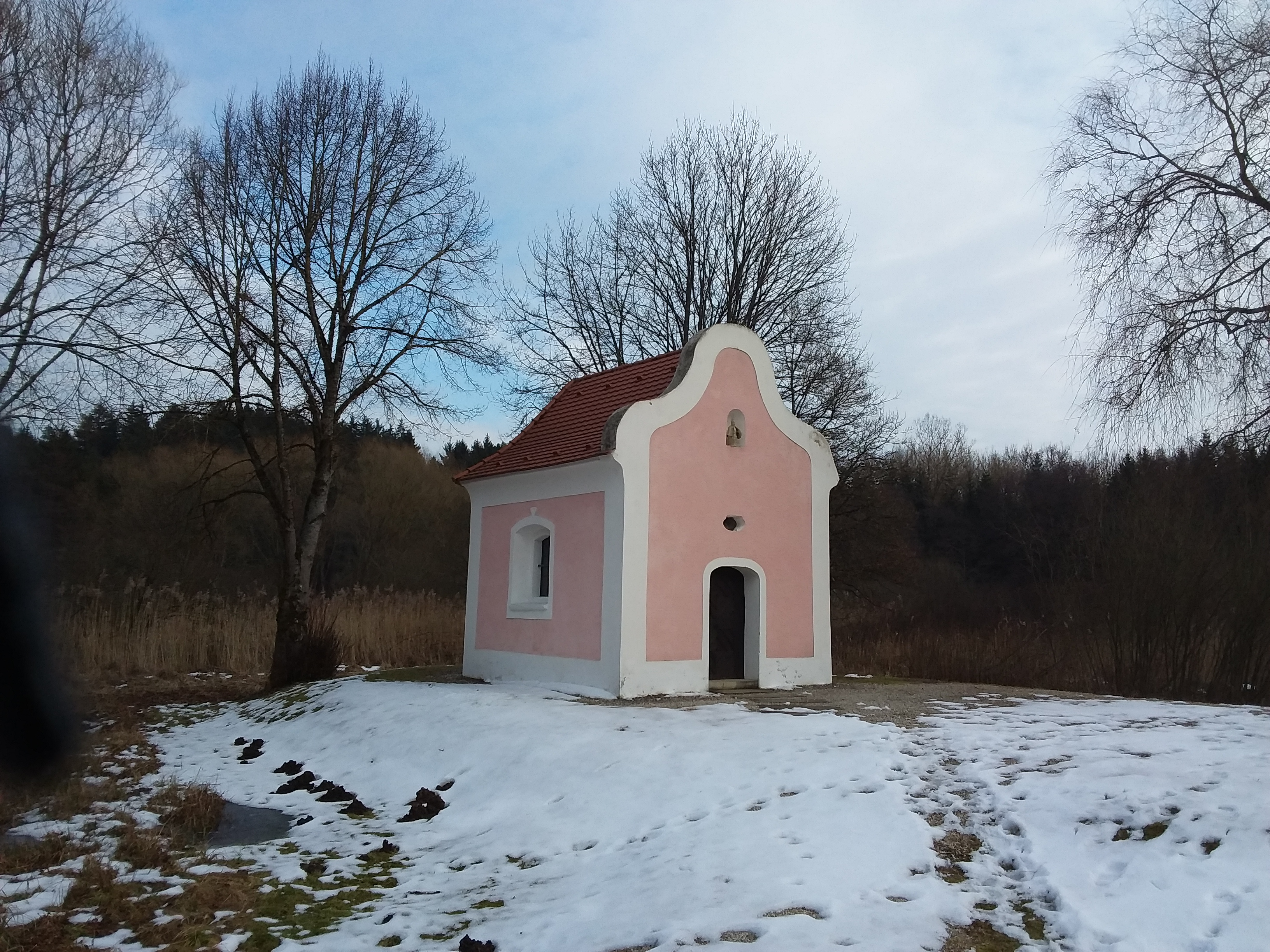 Kapelle St. Ulrich bei der Labermühle, Ortsteil von Deining im Landkreis Neumarkt in der Oberpfalz, Bayern